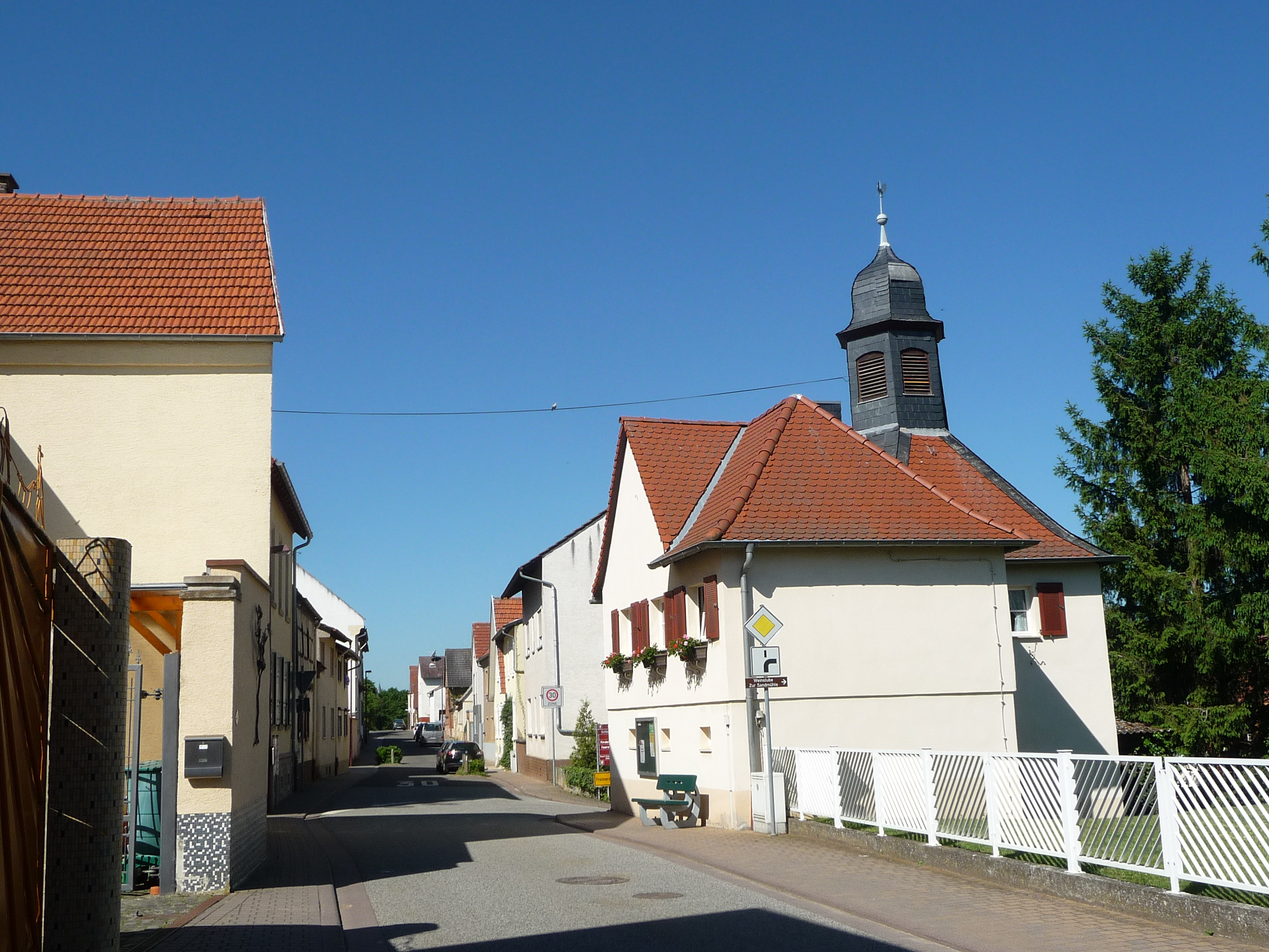 Wahlheim ist eine Ortsgemeinde im Landkreis Alzey-Worms in Rheinland-Pfalz.